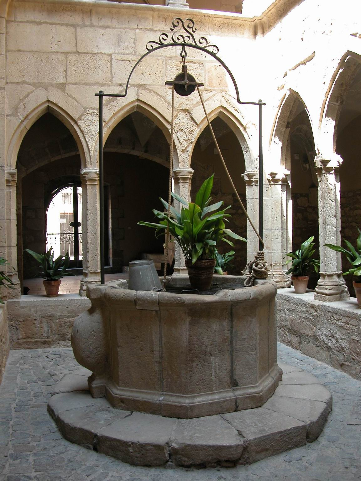 Pou del pati. Una bonica excursió amb en Josep Maria!